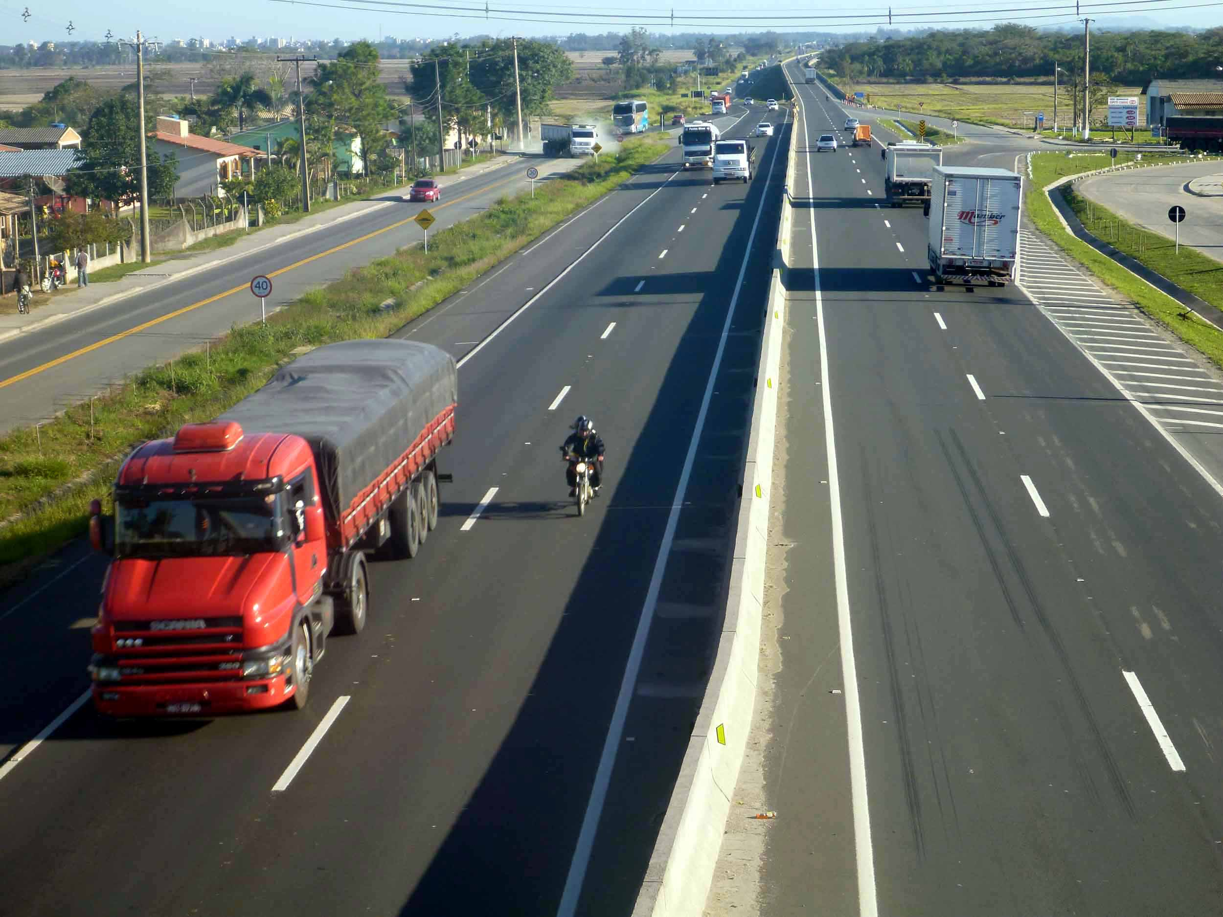 La BR-101 a su paso por el estado de Santa Catarina, en Brasil.